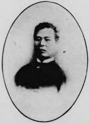 小野隆助（1839～1923）